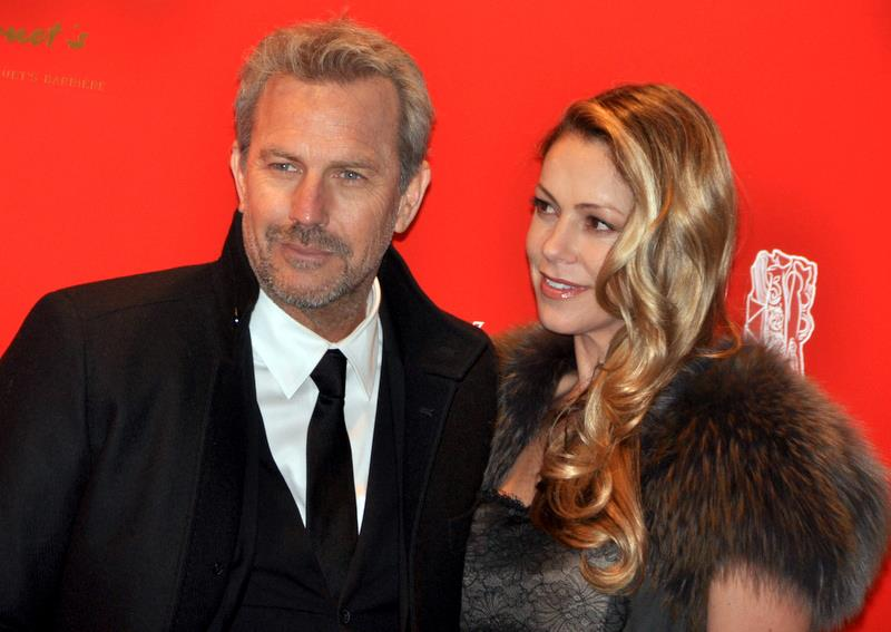 Kevin Costner et Christine Baumgartner à la cérémonie des César